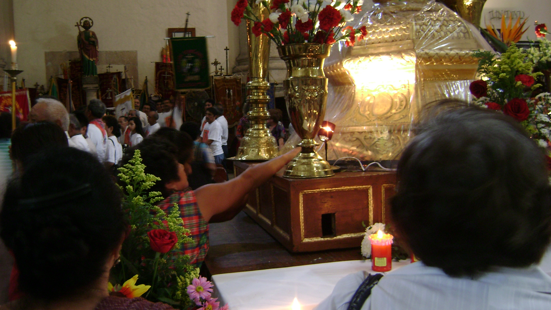 Santo de San Idelfonso Catolico en Mérida Yucatán